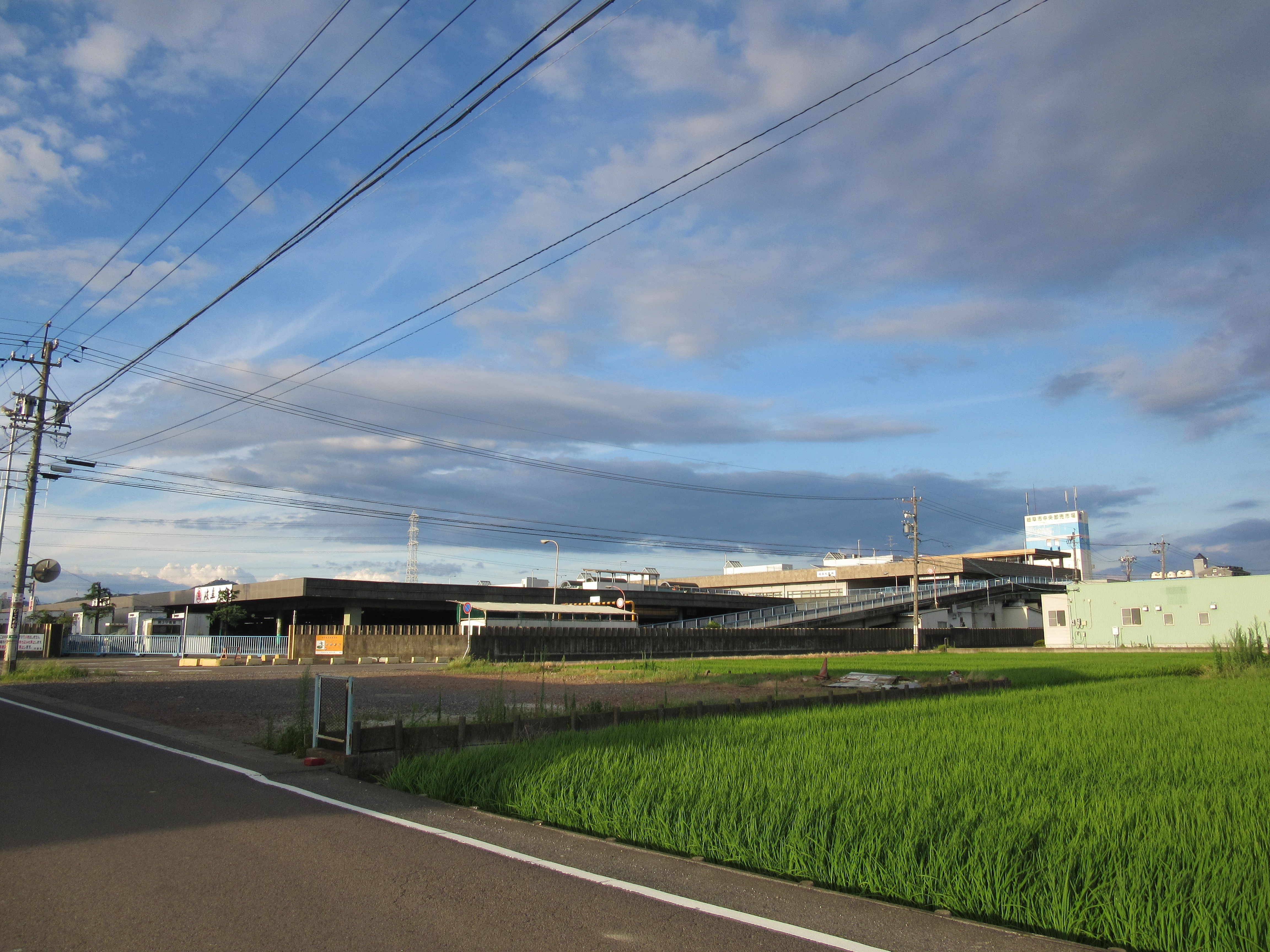 岐阜市中央卸売市場